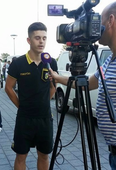 Milot Rashica